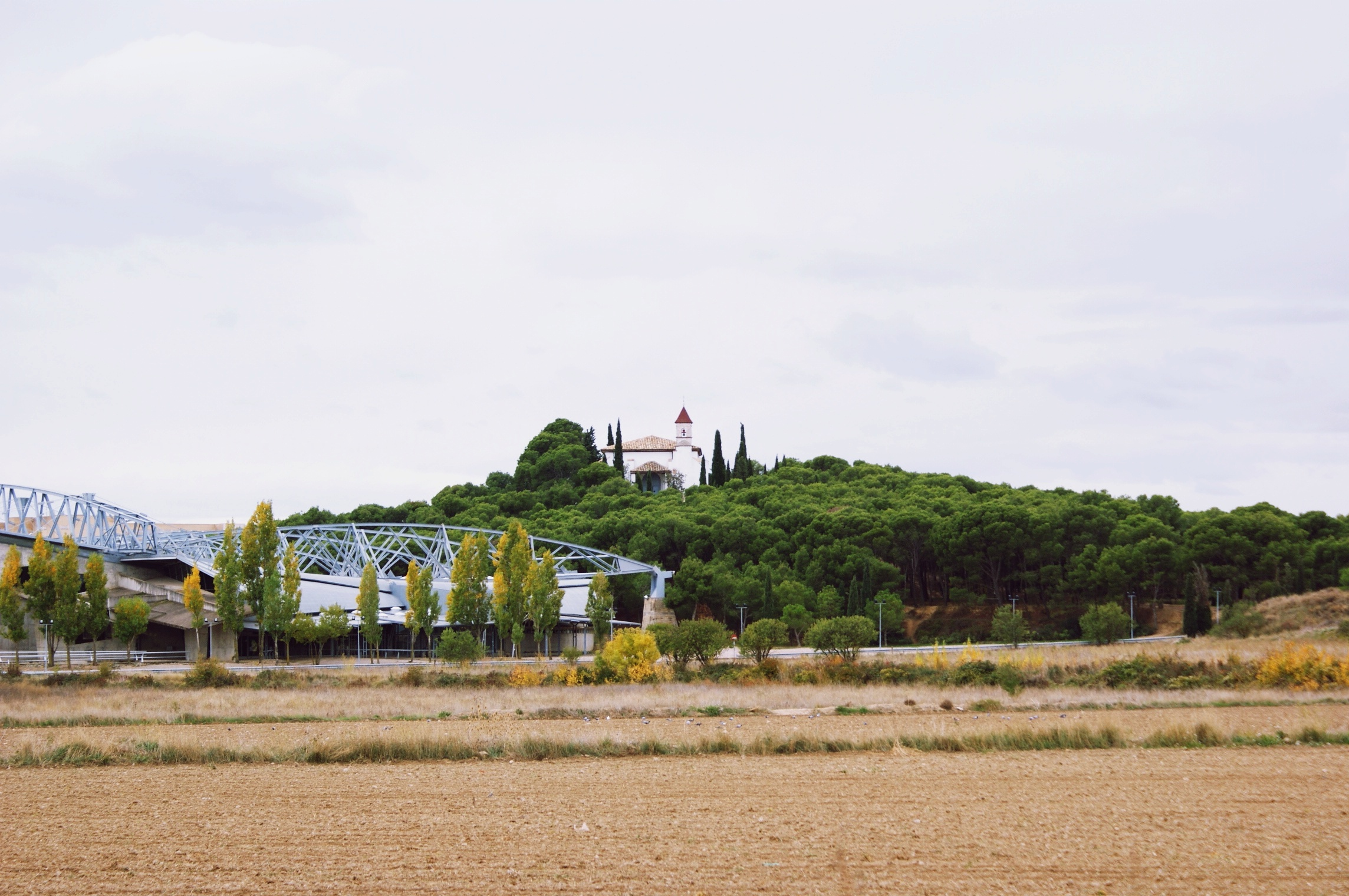 Ejemplo de encuadre horizontal